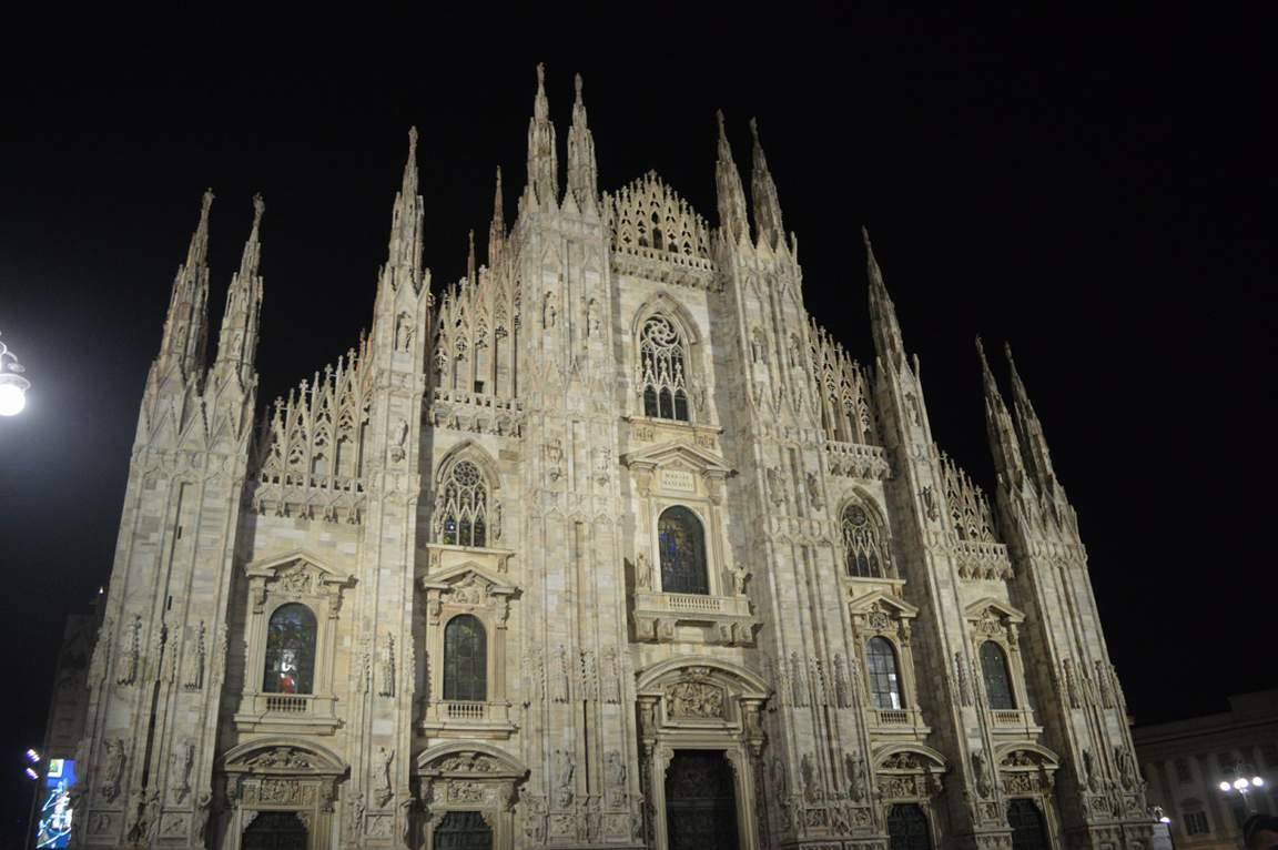 Duomo katedrala u Milanu, Italija